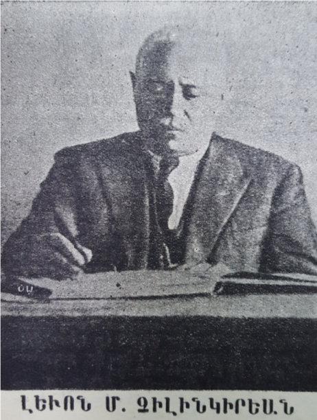 Լևոն Չիլինկիրյան